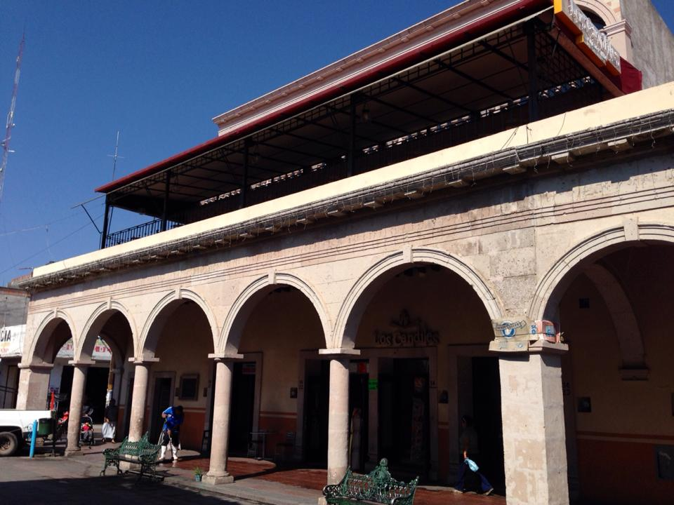 Portales del Centro Histórico en Uriangato, Gto.